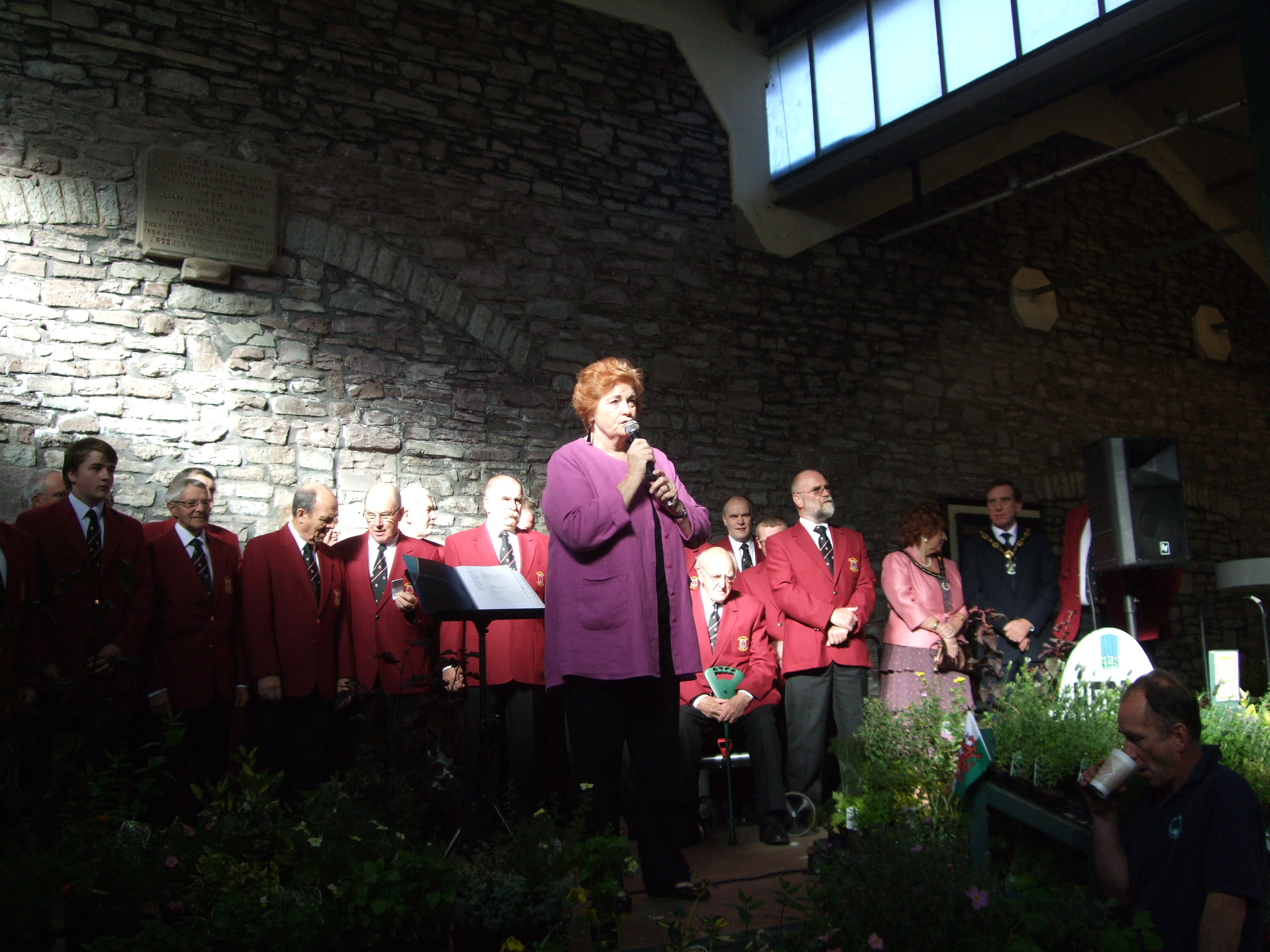 Llywydd yn agor y Gwyl / Presiding Officer opening the Festival